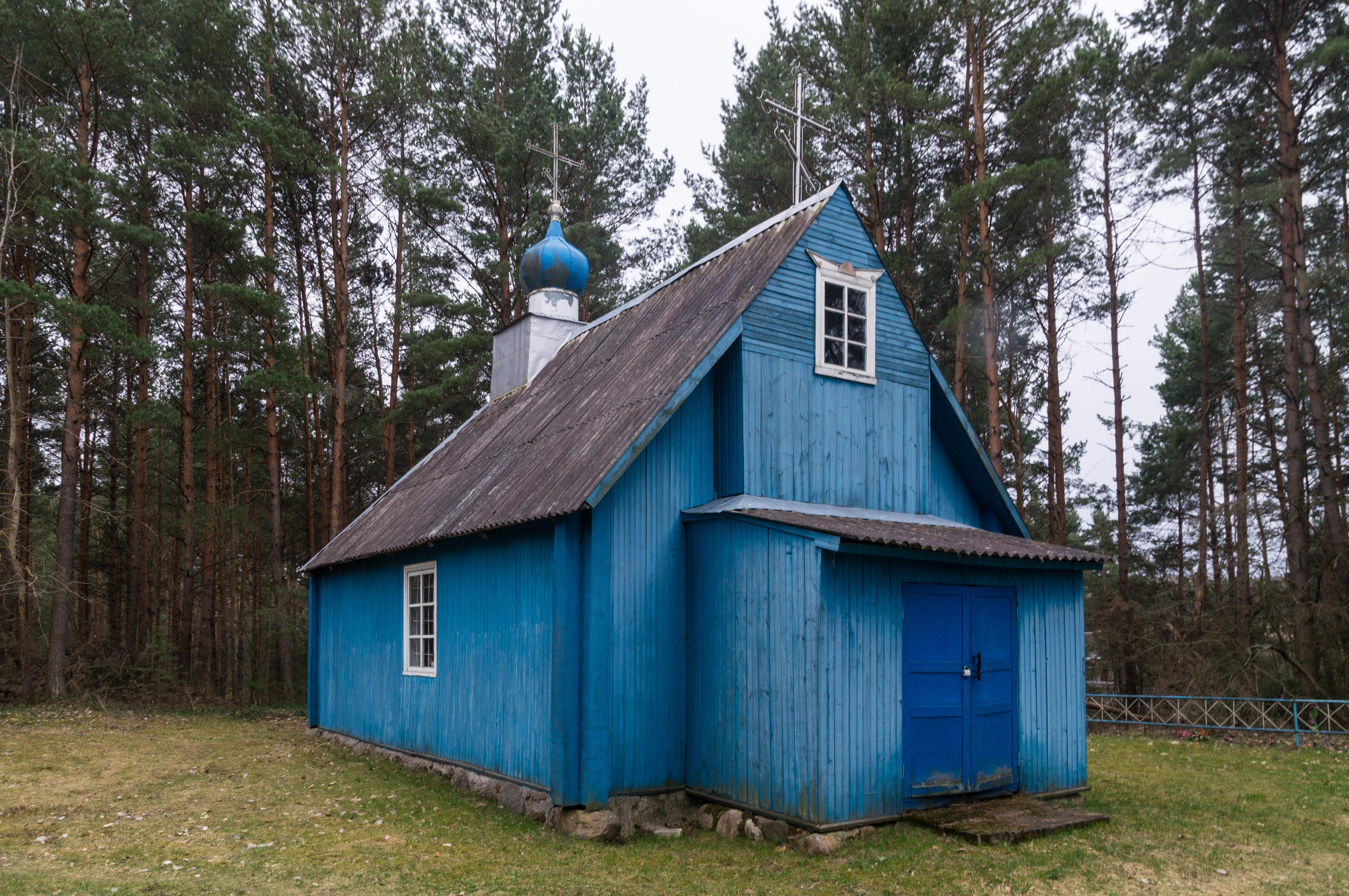 Свята-Мікалаеўская царква (Суднікі, Вілейскі раён)